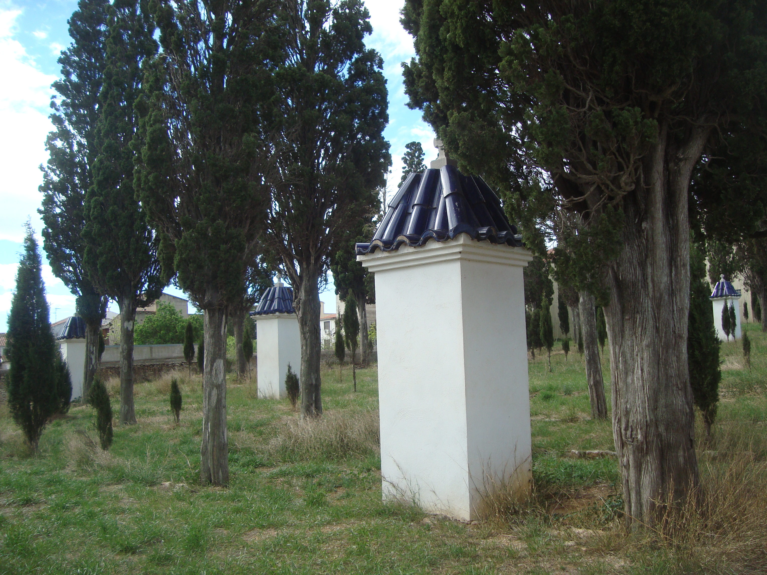 Calvario de Benlloch (Castellón)